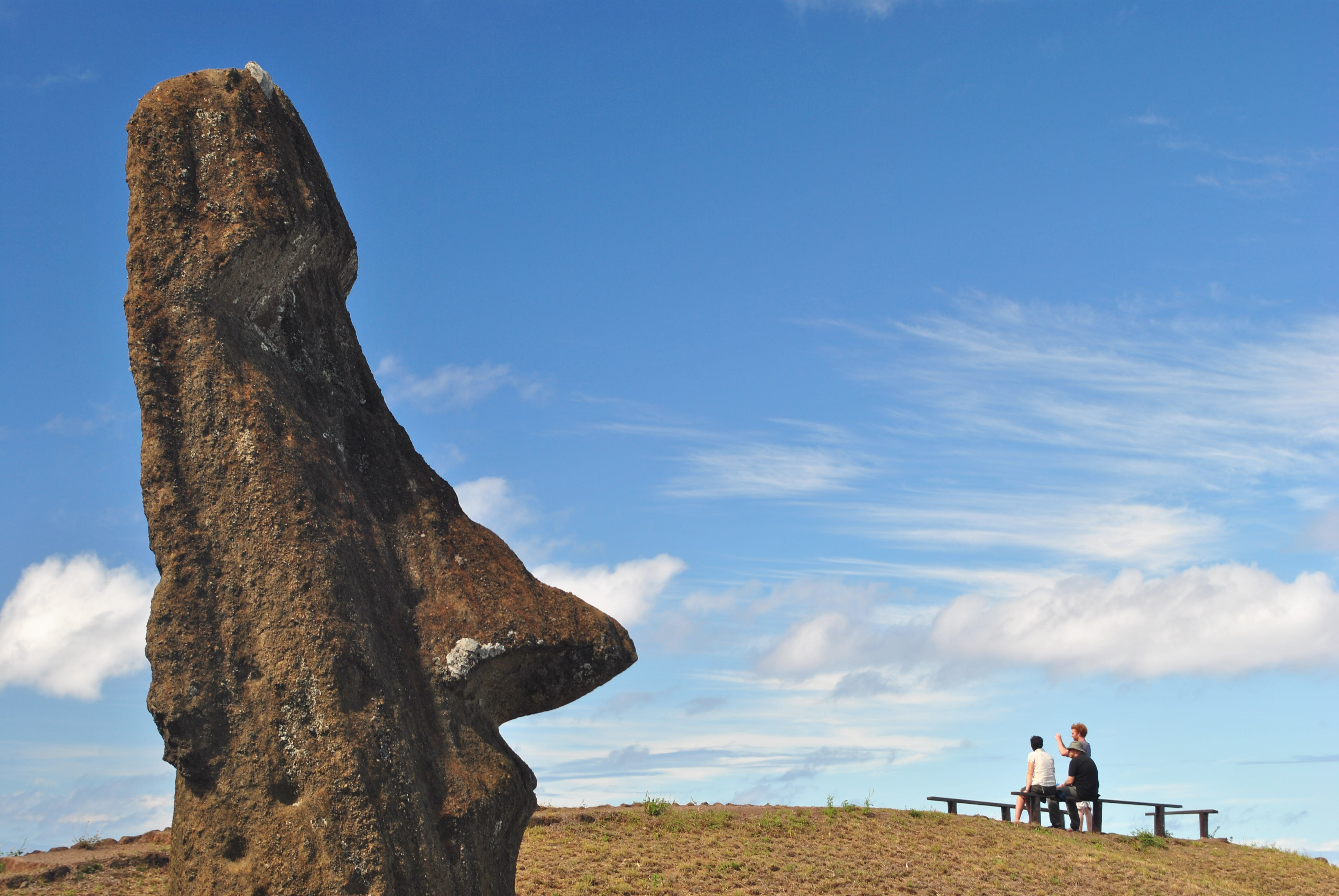 Isla de Pascua This is a photo of a national monument in Chile: 628